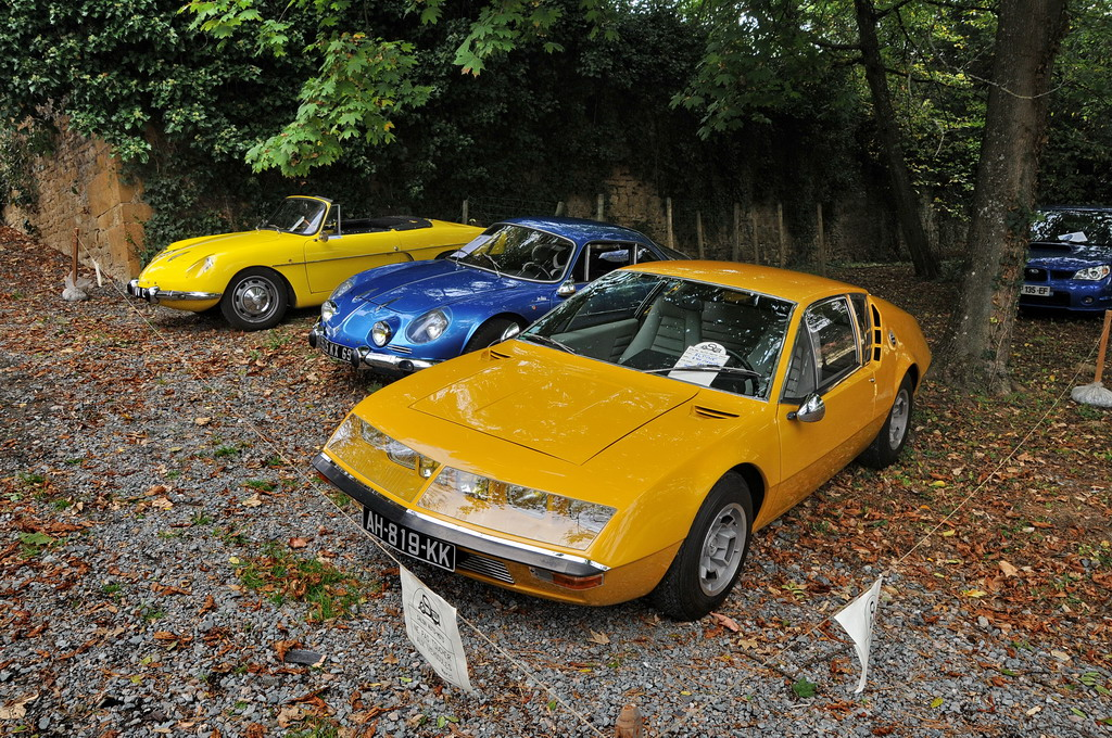 Van rechts naar links / starting on the right side: Alpine A310 (1972), Alpine A110 (1970) (Berlinette Tour de France) en Alpine A108 Cabriolet (1961). Bij de bouw van deze auto’s werd veelvuldig gebruik gemaakt van onderdelen van diverse modellen van Renault zoals de Dauphine en de R8. In 1973 werd het merk door Renault overgenomen. Alpine was a French manufacturer of racing and sports cars that used rear mounted Renault engines.